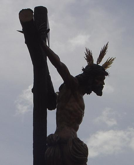 Semana Santa de Sevilla 2010. Cristo de la Sed, obra del escultor Luis Álvarez Duarte